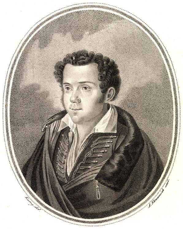 Ferenczy István (1792-1856) szobrász